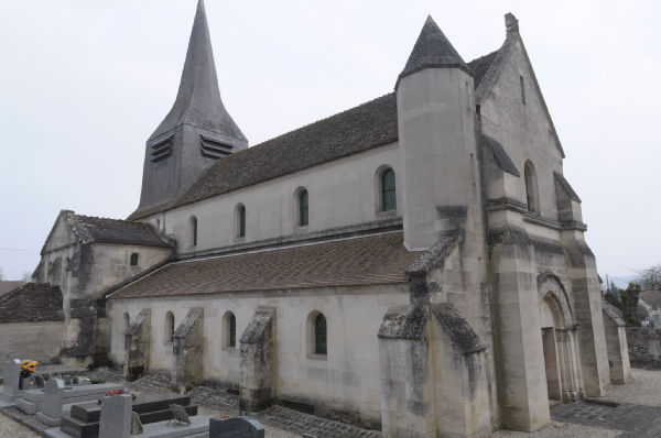 Trucy - Église Sainte-Trinité